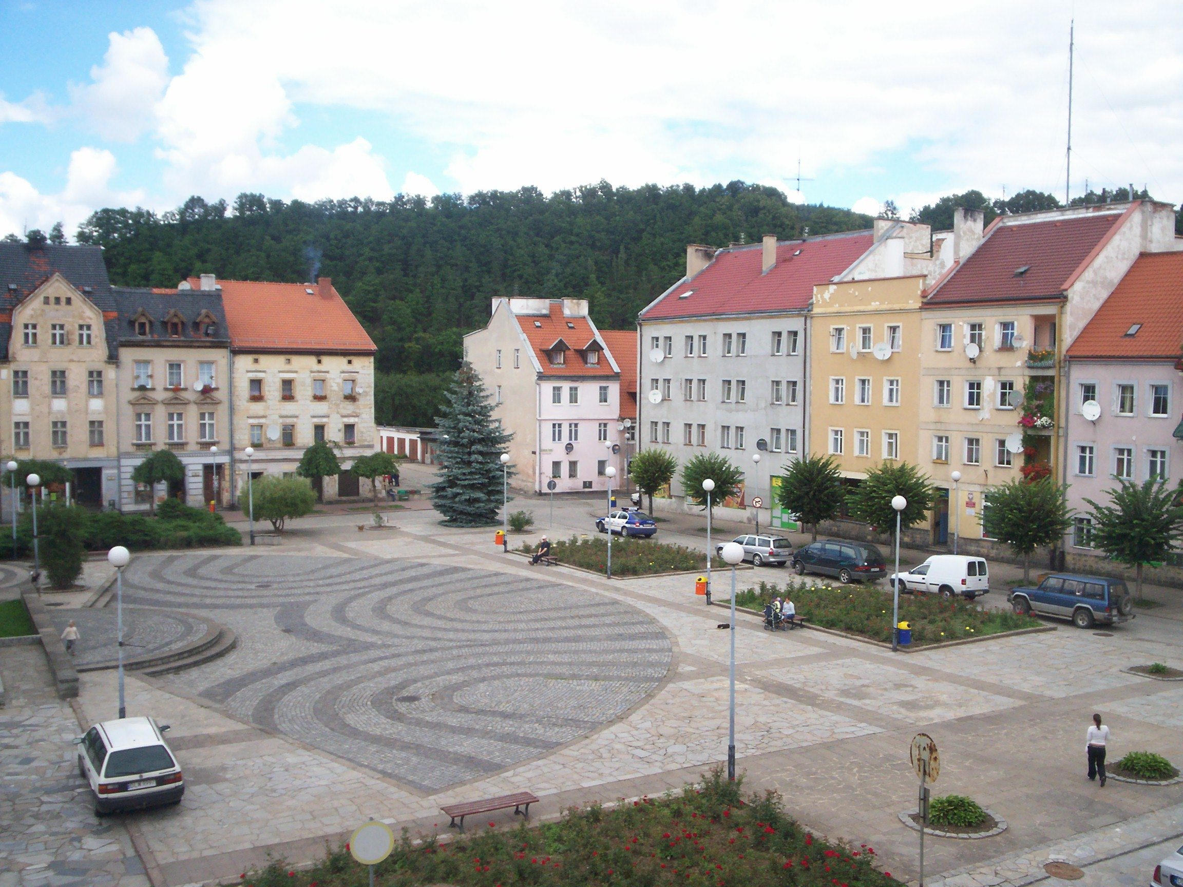 Rynek we Wleniu